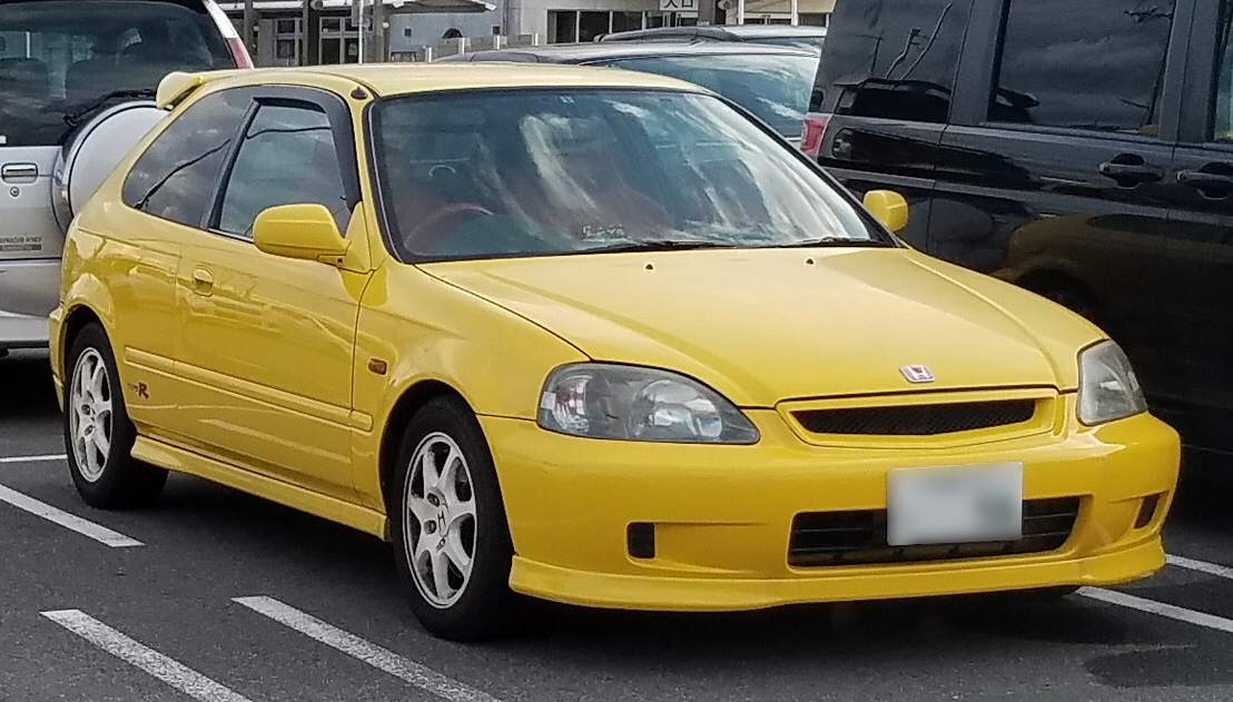 シビック タイプR（後期型）